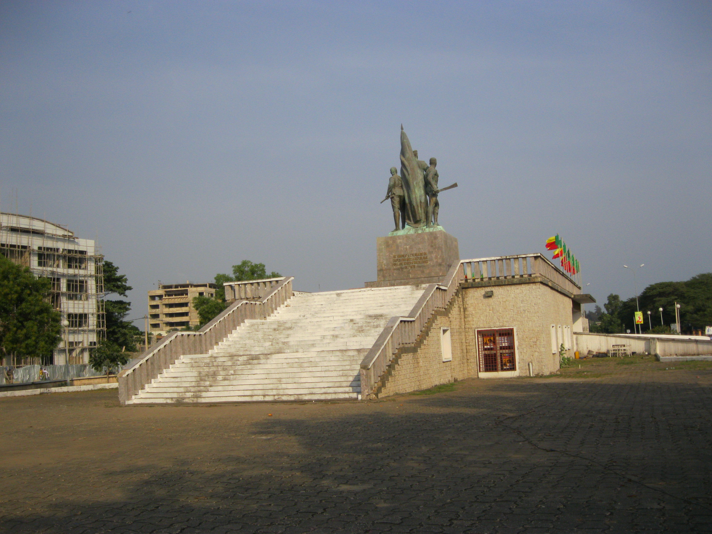 La place du souvenir (Ancienne place des martyrs) de Cotonou au Bénin